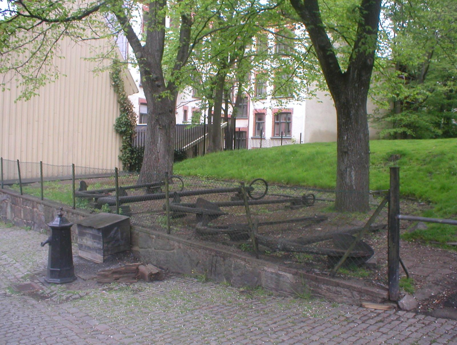 Foto av Jedeurska trädgården, Majorna, Göteborg, taget av Per Johansson 2005.